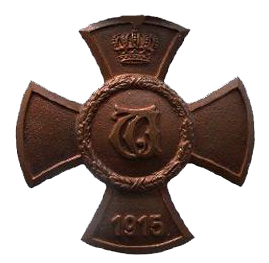 Wilhelmskreuz des Königreichs Württemberg